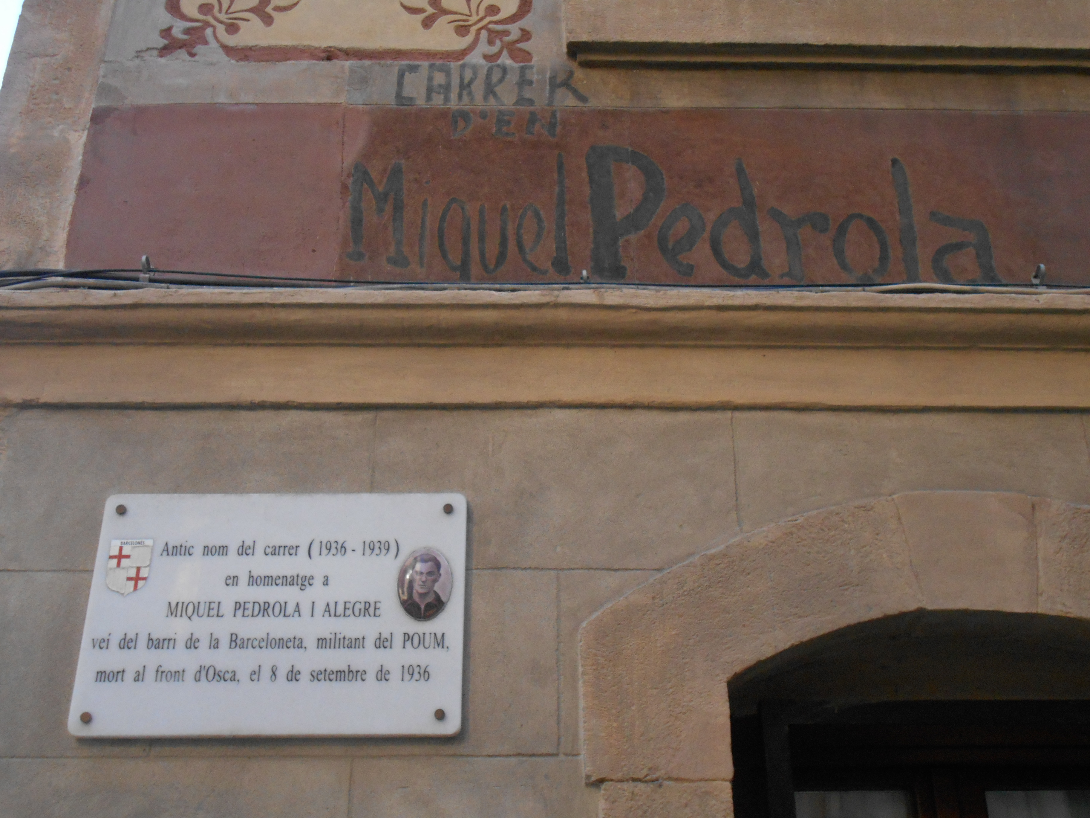 Calle de Miquel Pedrola, actualmente San Miguel.